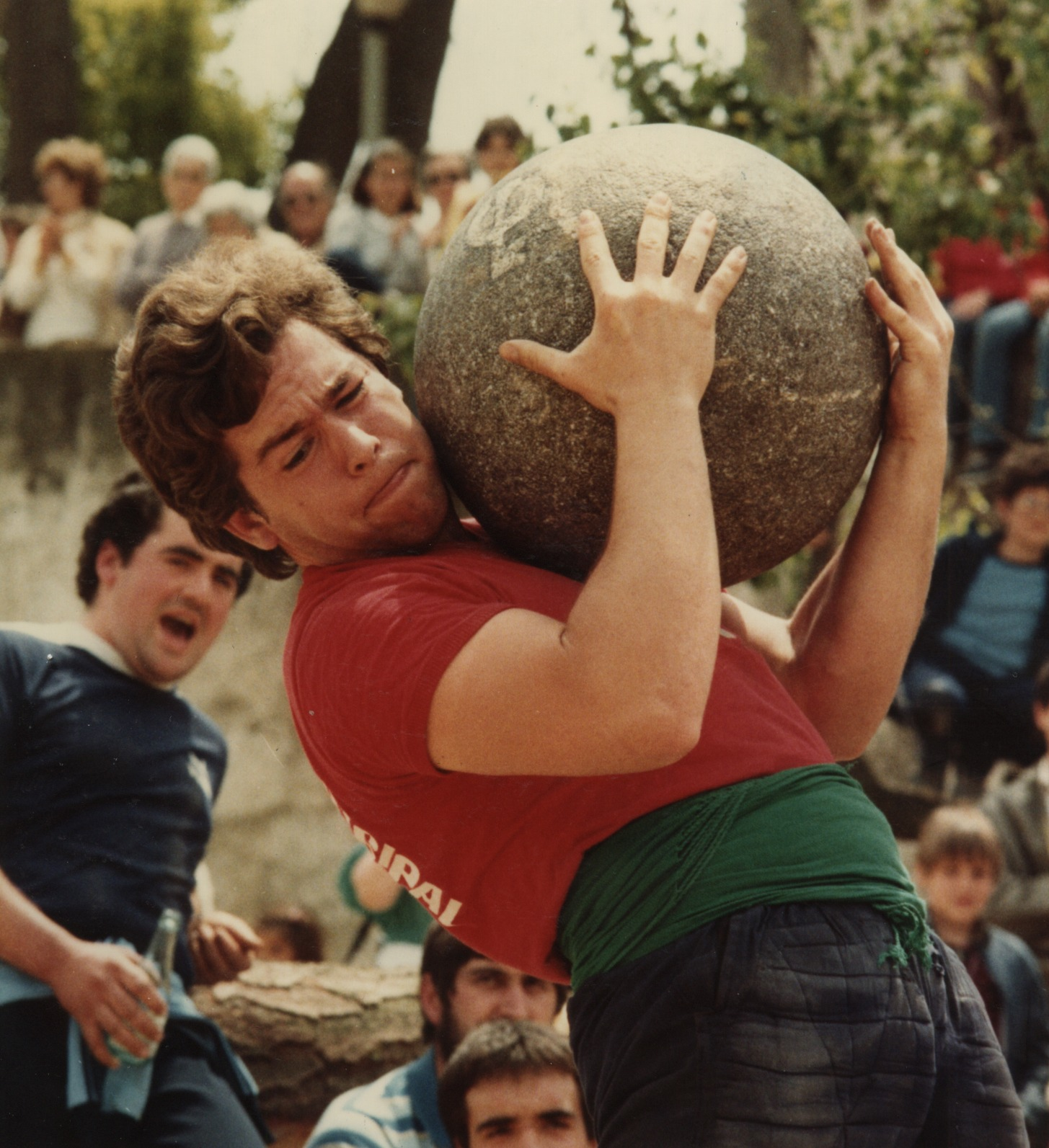 Harrijasotzailea harri zilindrikoarekin lanean.